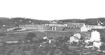 Le fort Lamalgue à Toulon en 1890